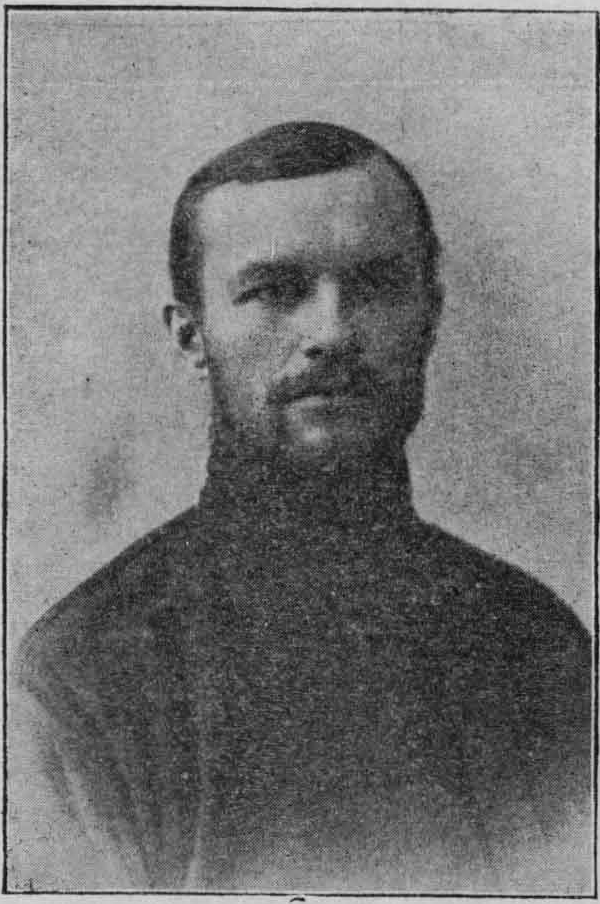 Сымон Рак-Міхайлоўскі, беларускі грамадска-палітычны дзеяч, публіцыст, педагог. Каля 1919 года.